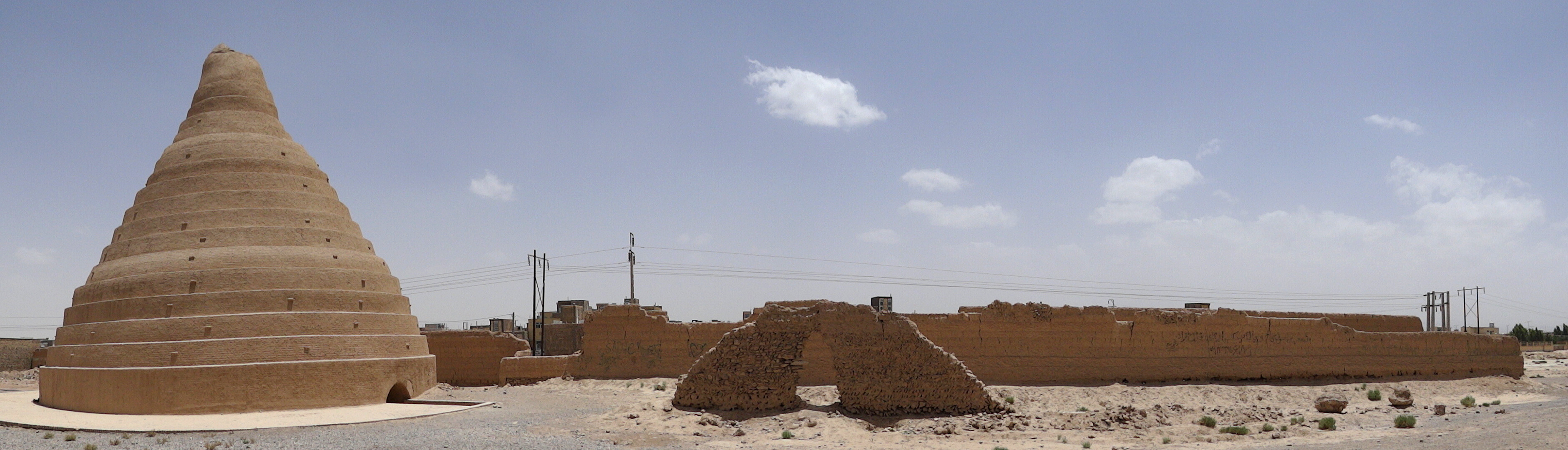 Panorama of Icehouse - Abarqu - Central Iran